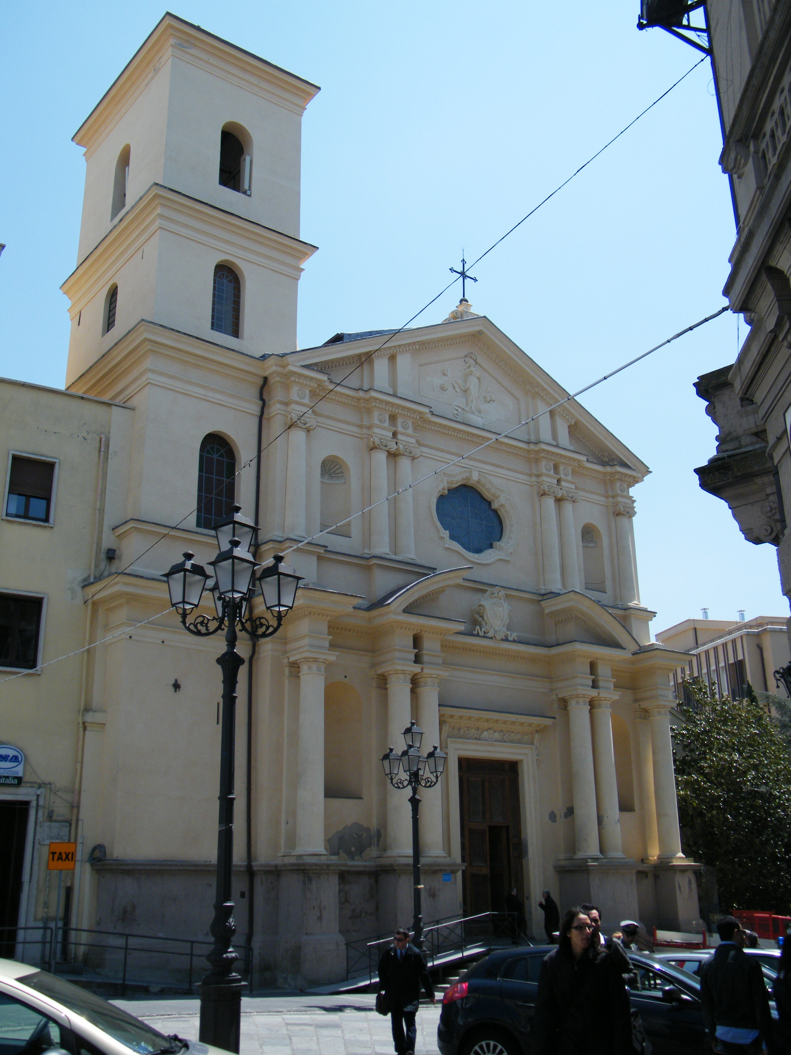 Basilica dell'Immacolata, esterno